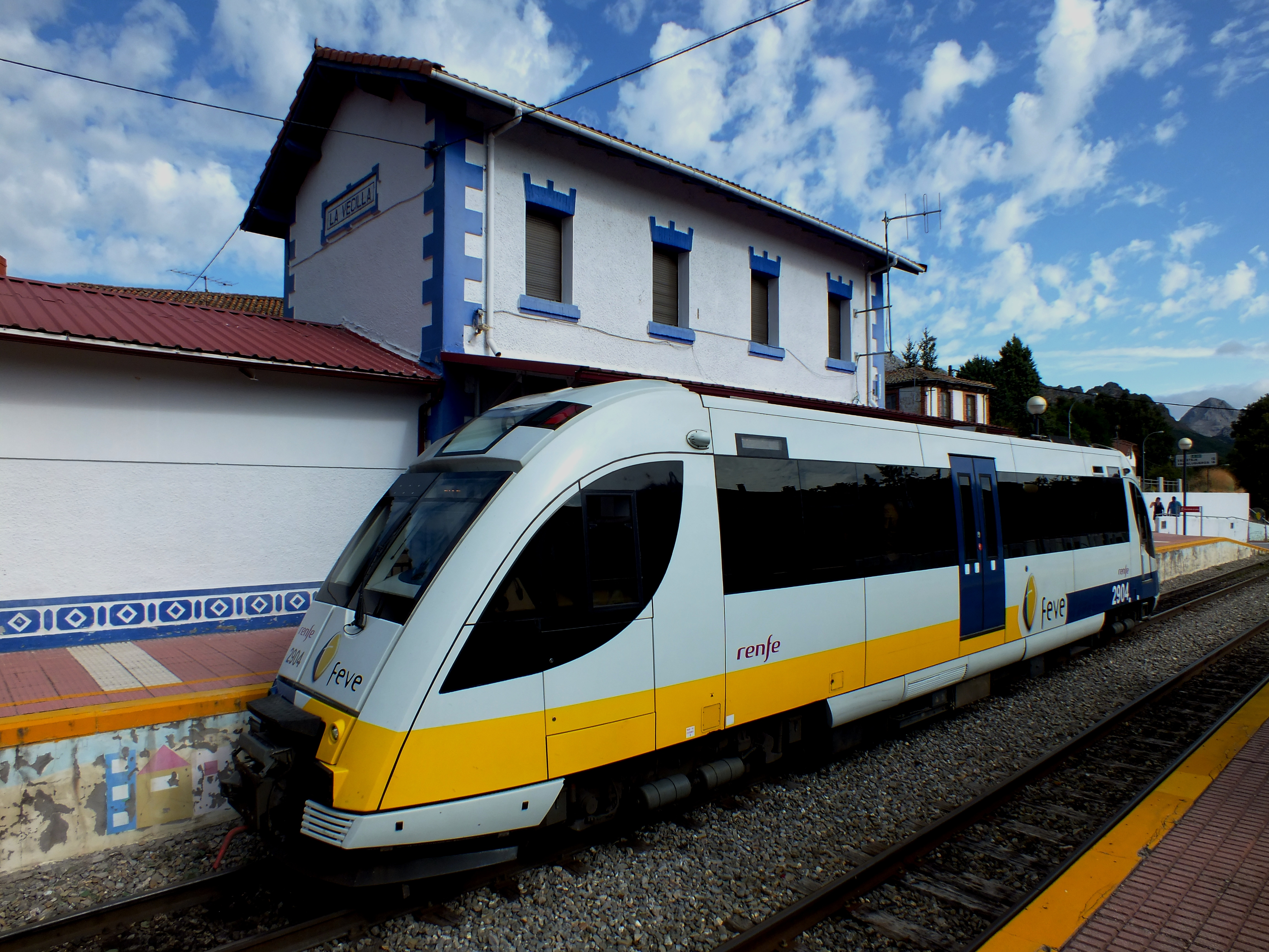 Estación de La Vecilla (León, España)